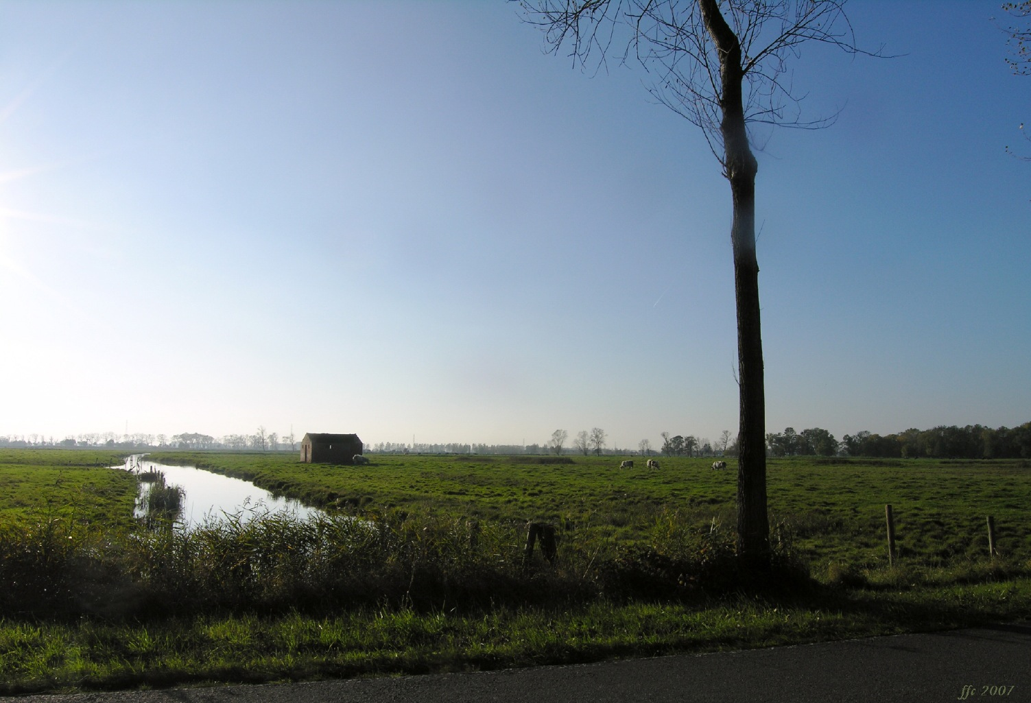 Polder entre Ter Doest i Lissewege